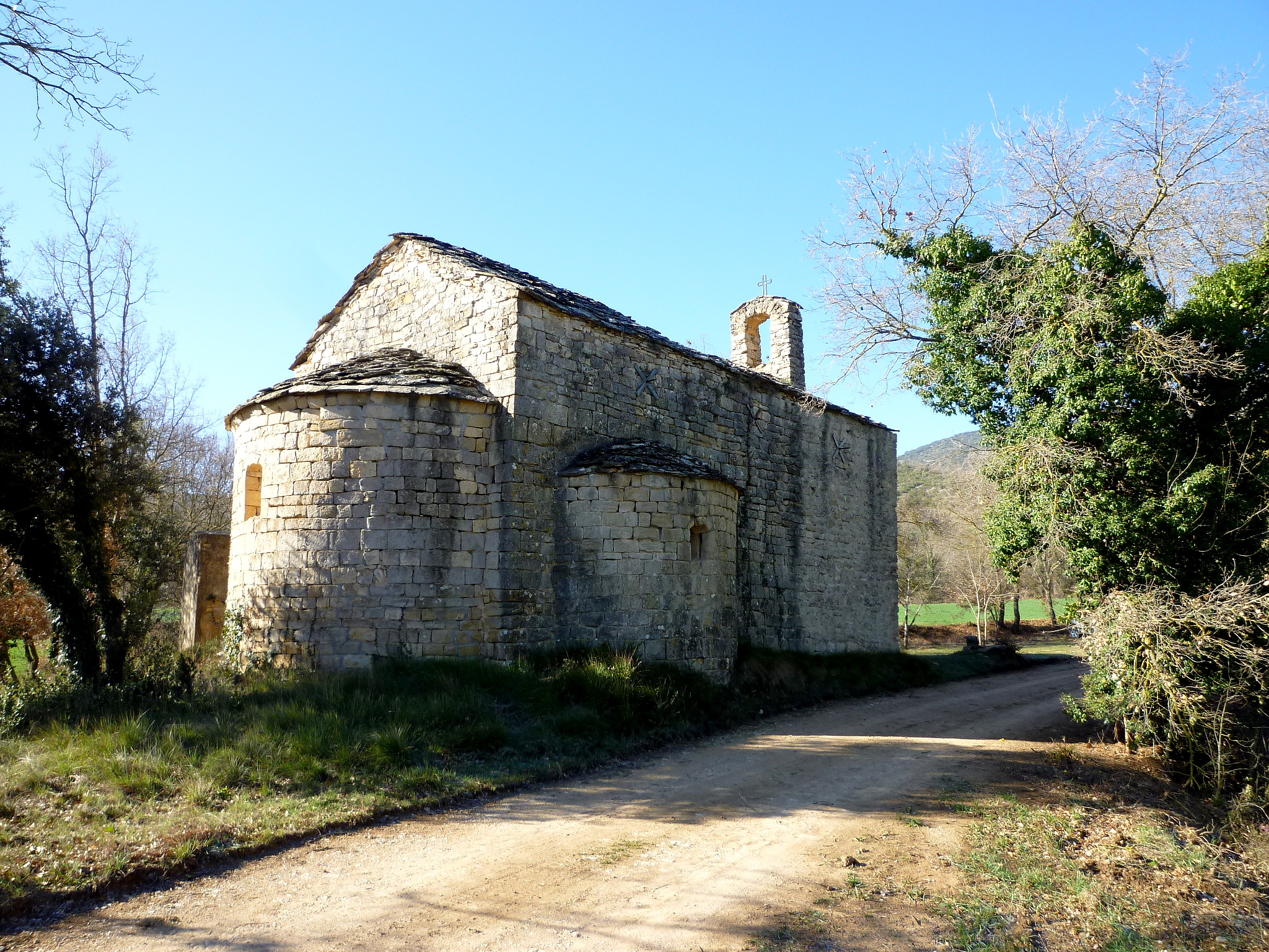 Església de Sant Bartomeu d'Ariet, a la Vall d'Ariet (Artesa de Segre) This is a a photo of a natural area in Catalonia, Spain, with id: ES510192